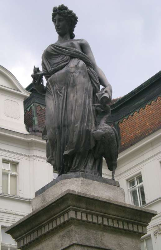 Der Wachsamkeitsbrunnen auf dem Schlesingerplatz in der Josefstadt in Wien